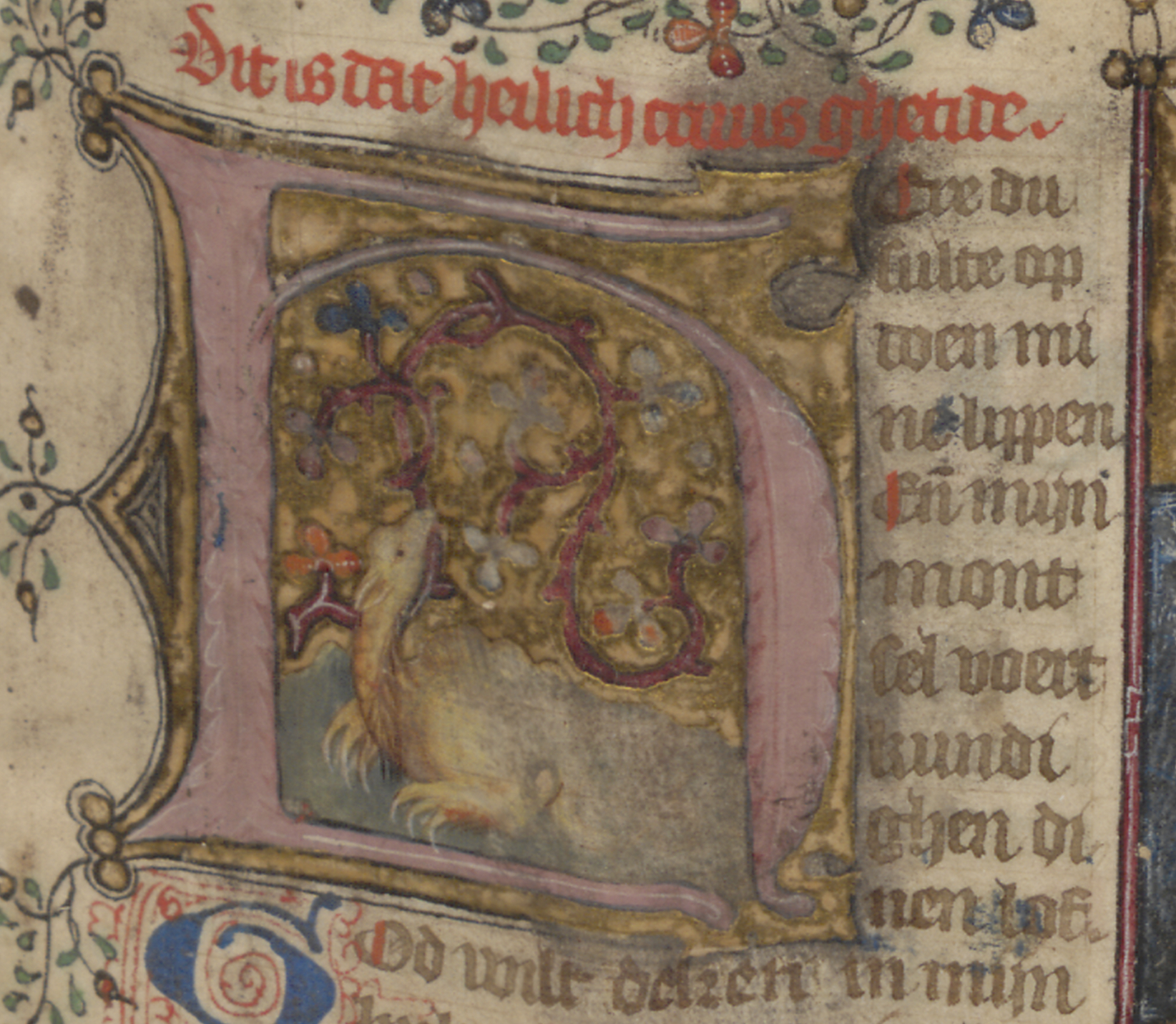 Hs. 16 B 8, f. 92r. Initiaal met een draakje.